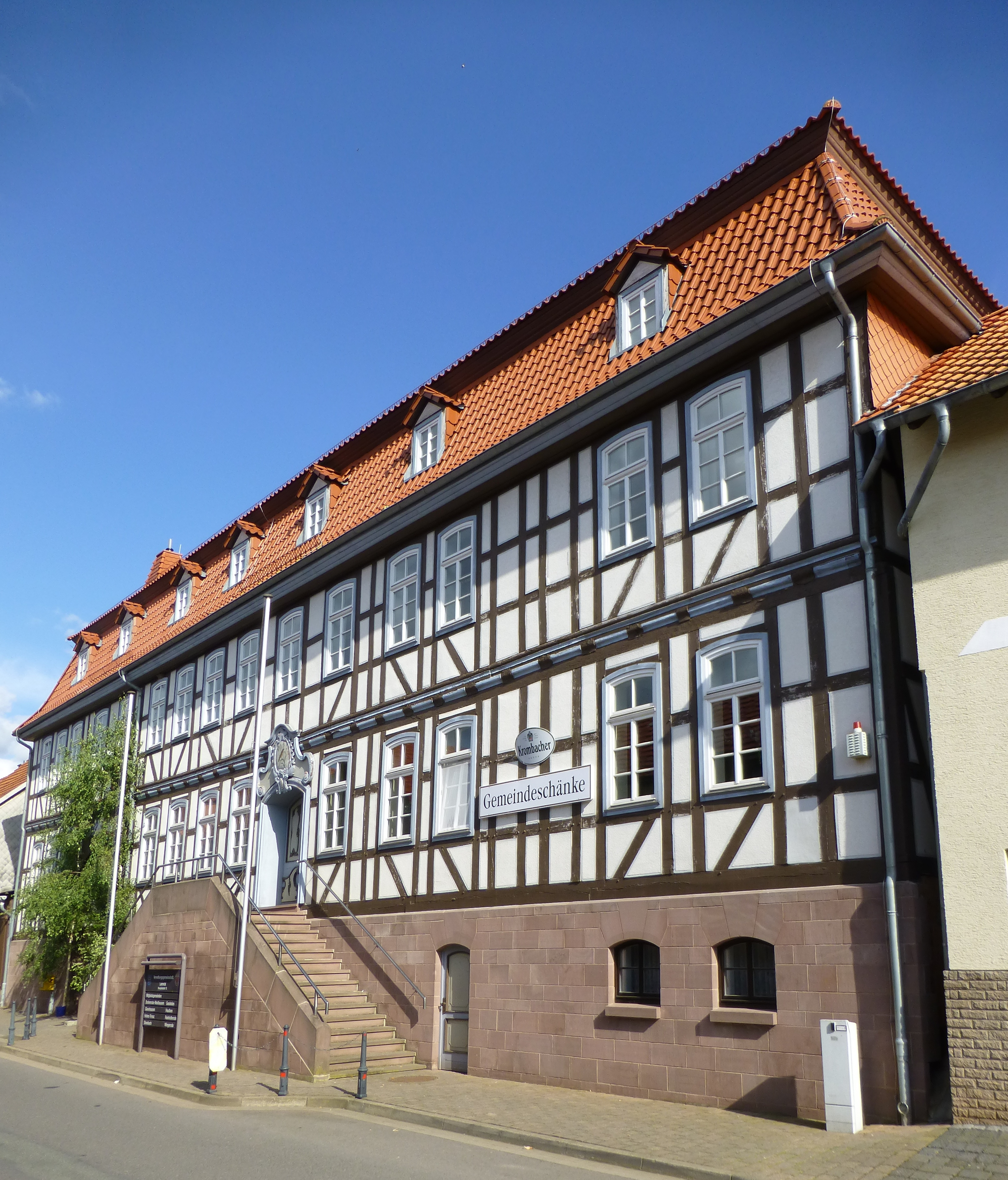 Gebäude der Verwaltungsgemeinschaft Leinetal in Bodenrode